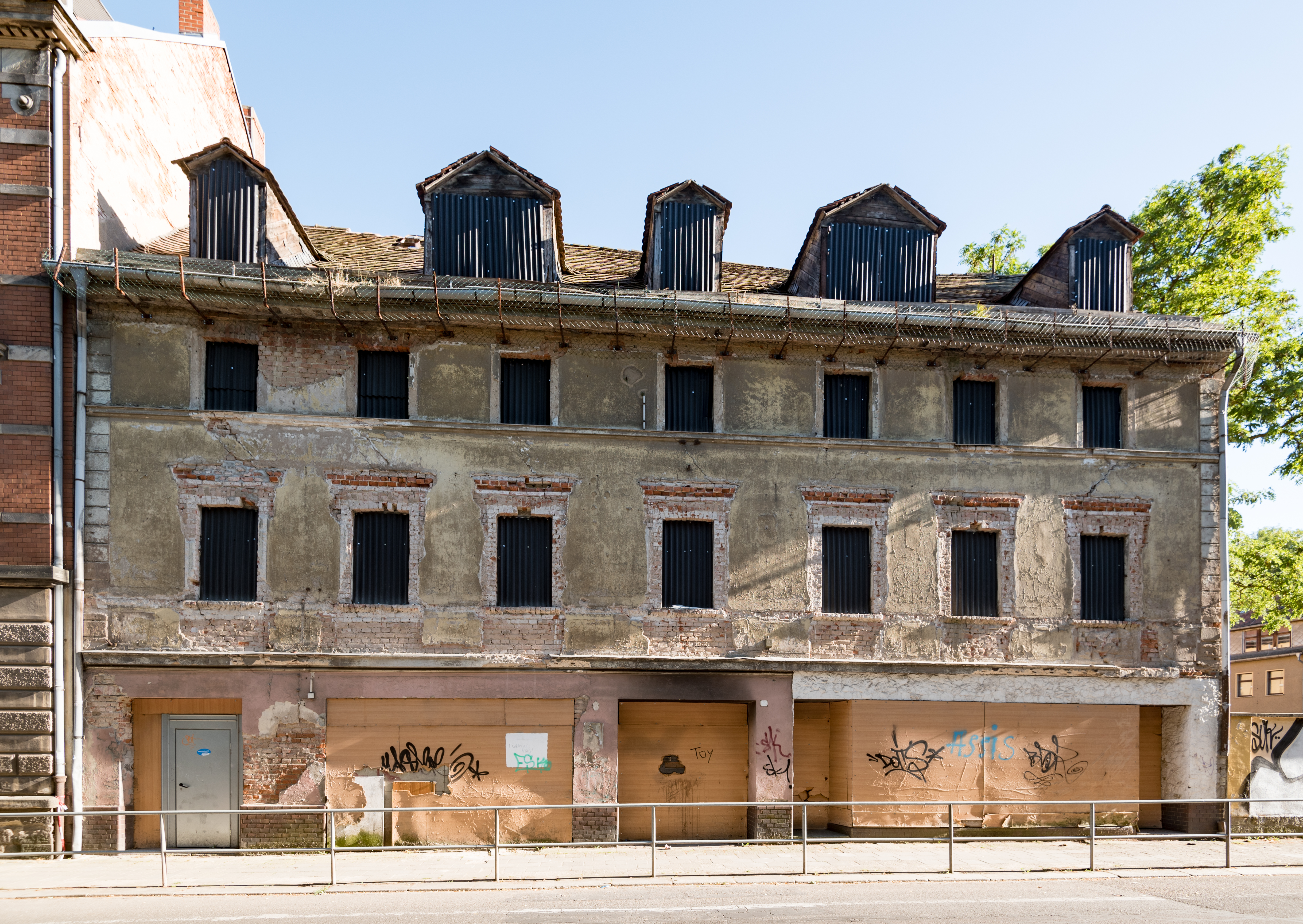 Weißenfels, Beuditzstraße 32